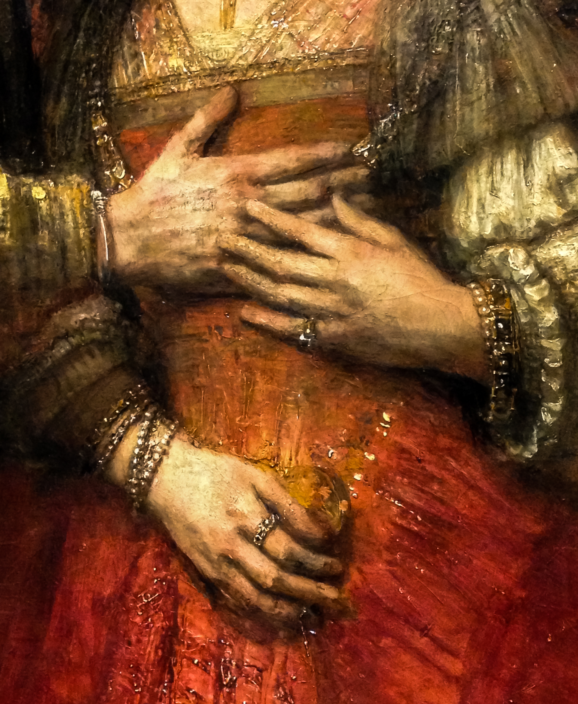 Rembrandt